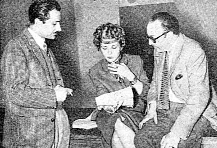 Daniele D'Anza, Delia Scala e Mario Landi esaminano il copione di "Storia di un biglietto da un milione"